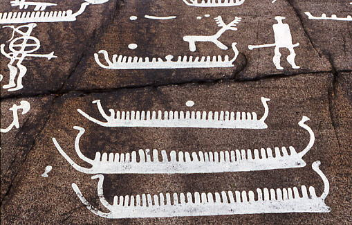 Gravure préhistorique de la région de Tanum